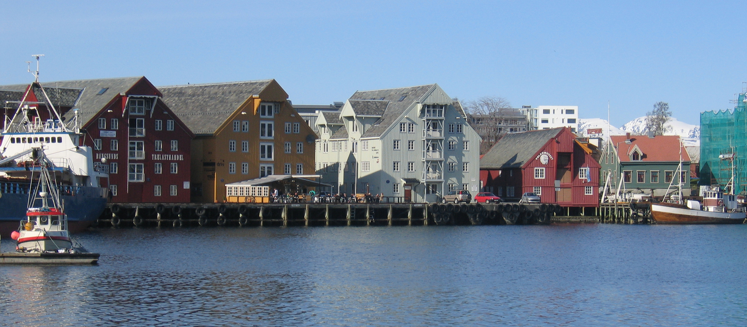 Tromsø, sjøboder. Old storehouses by Tromsø harbour.